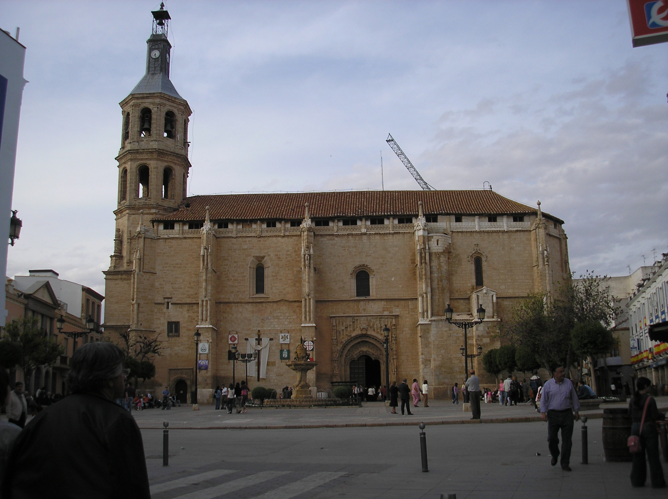 Iglesia de la Asunción, Valdepeñas. Imagen propia del usuario Valdoria.